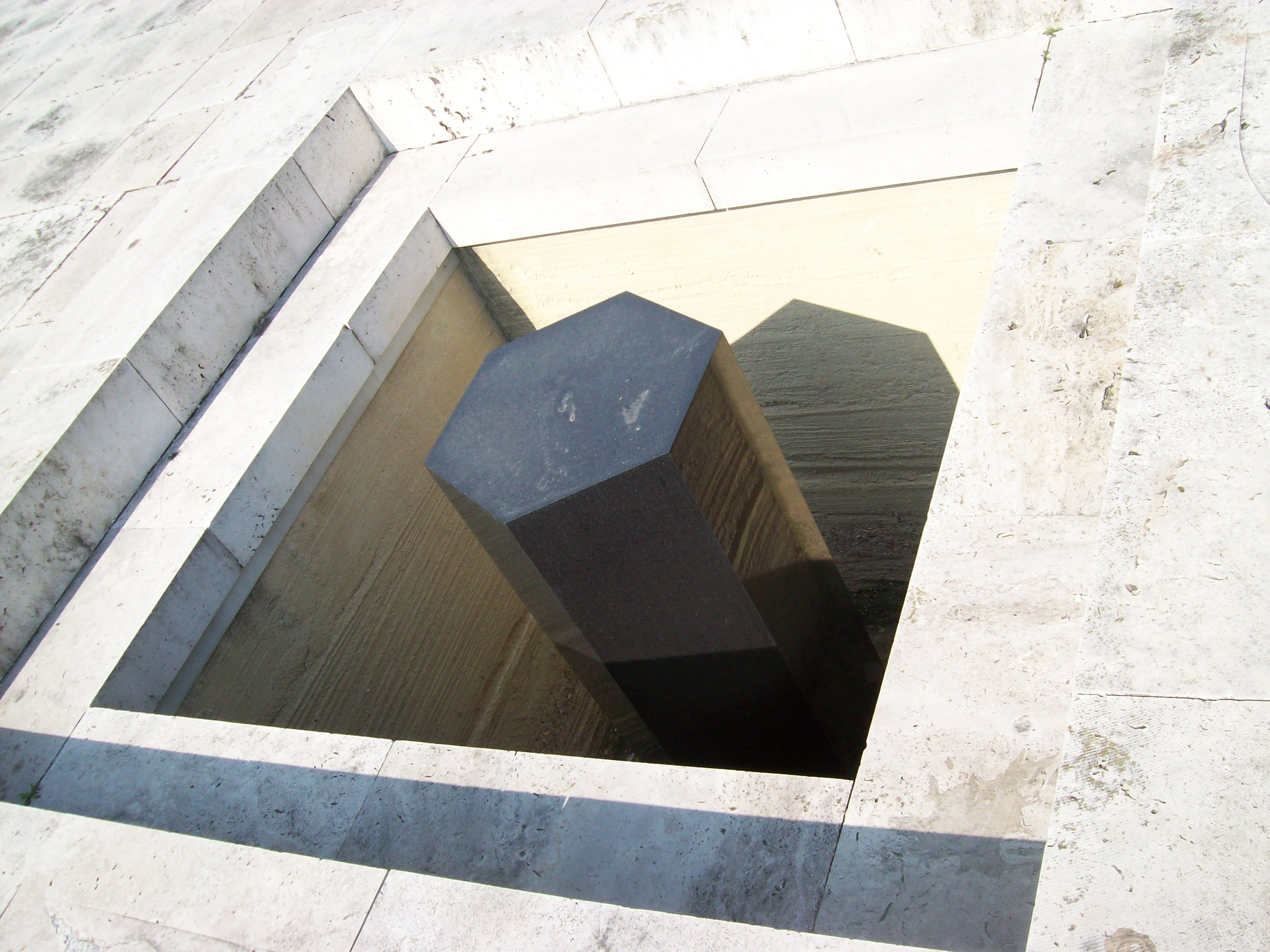 A fekete gránit hasáb a 300-as parcellában (Budapest, Kőbánya, Újköztemető)